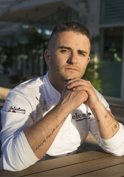 Juan Manuel Barrientos Valencia